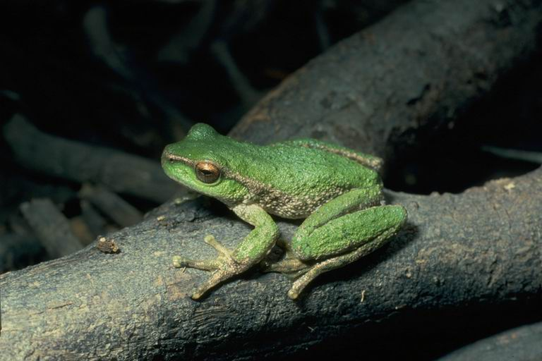 Litoria spenceri